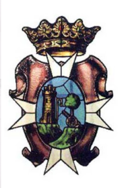 Escudo de Tembleque (Toledo)